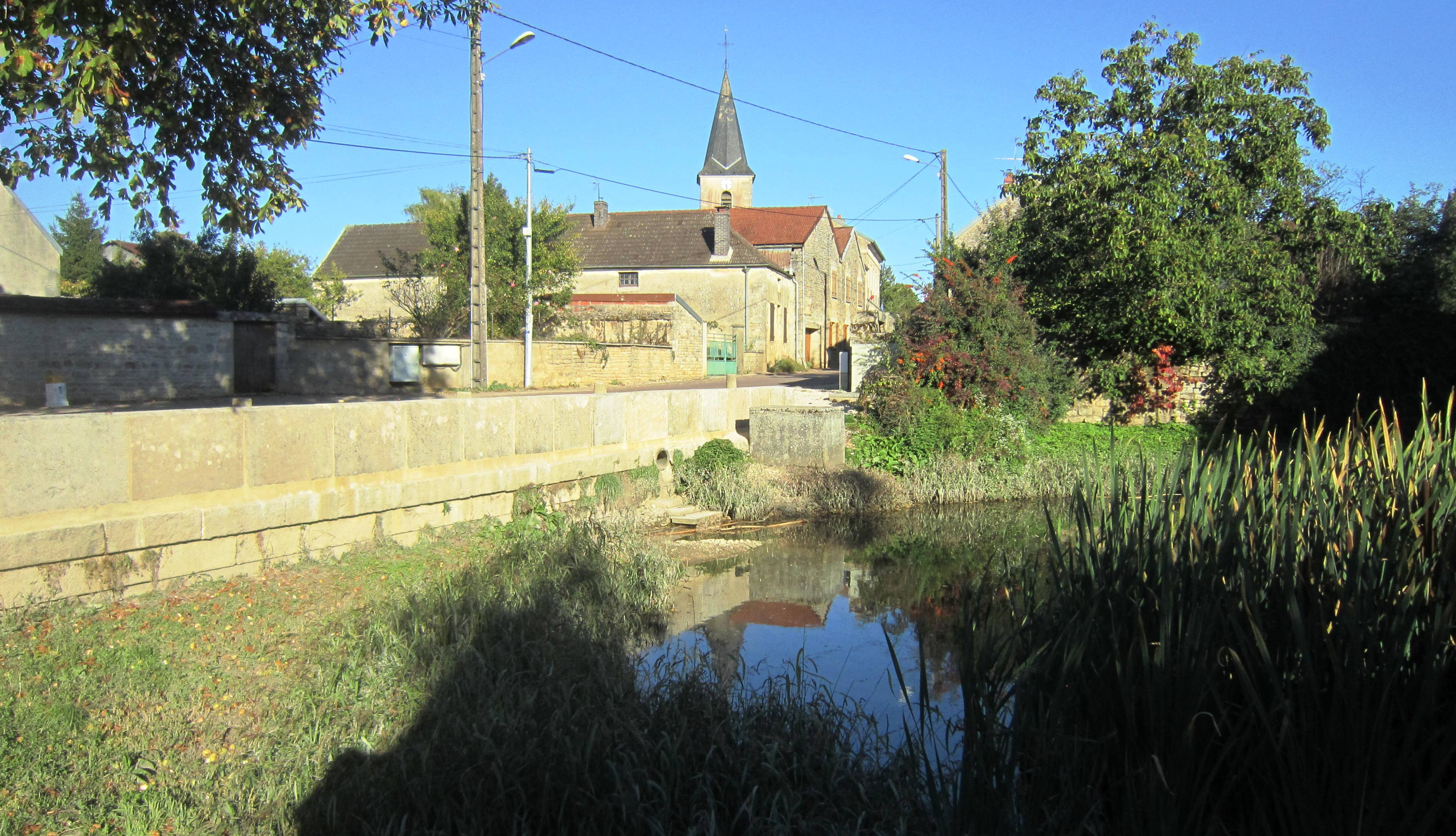 Savoisy (Côte-d'Or)